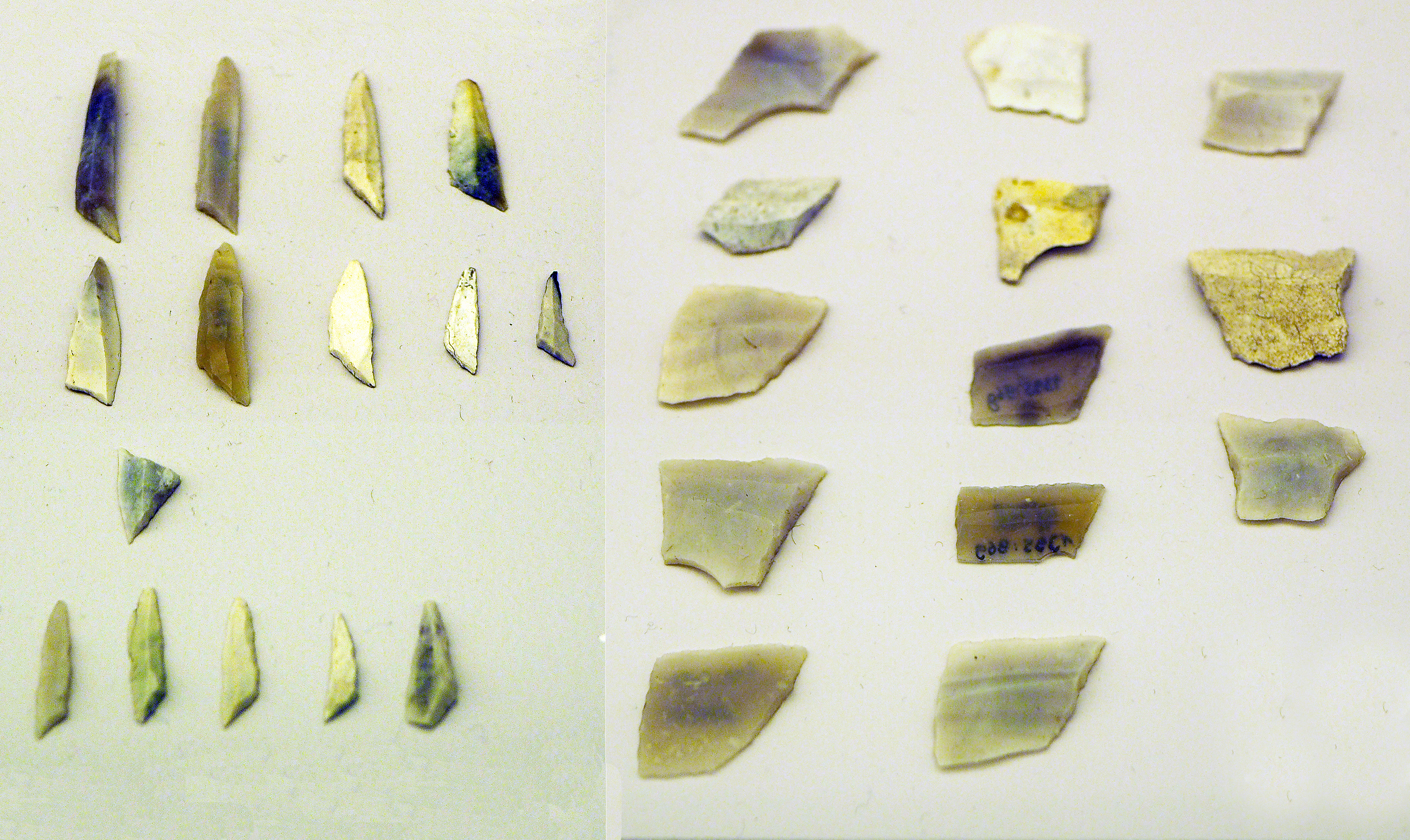 Flinteinsätze (Feuersteine) aus der Jüngeren Mittelsteinzeit, Fundort Stadt Bergen, Ortsteil Diesten, Landkreis Celle, Niedersachsen